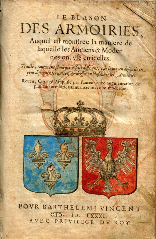 Le blason des armoiries címlapja (kiadva Lyonban 1579-ben)